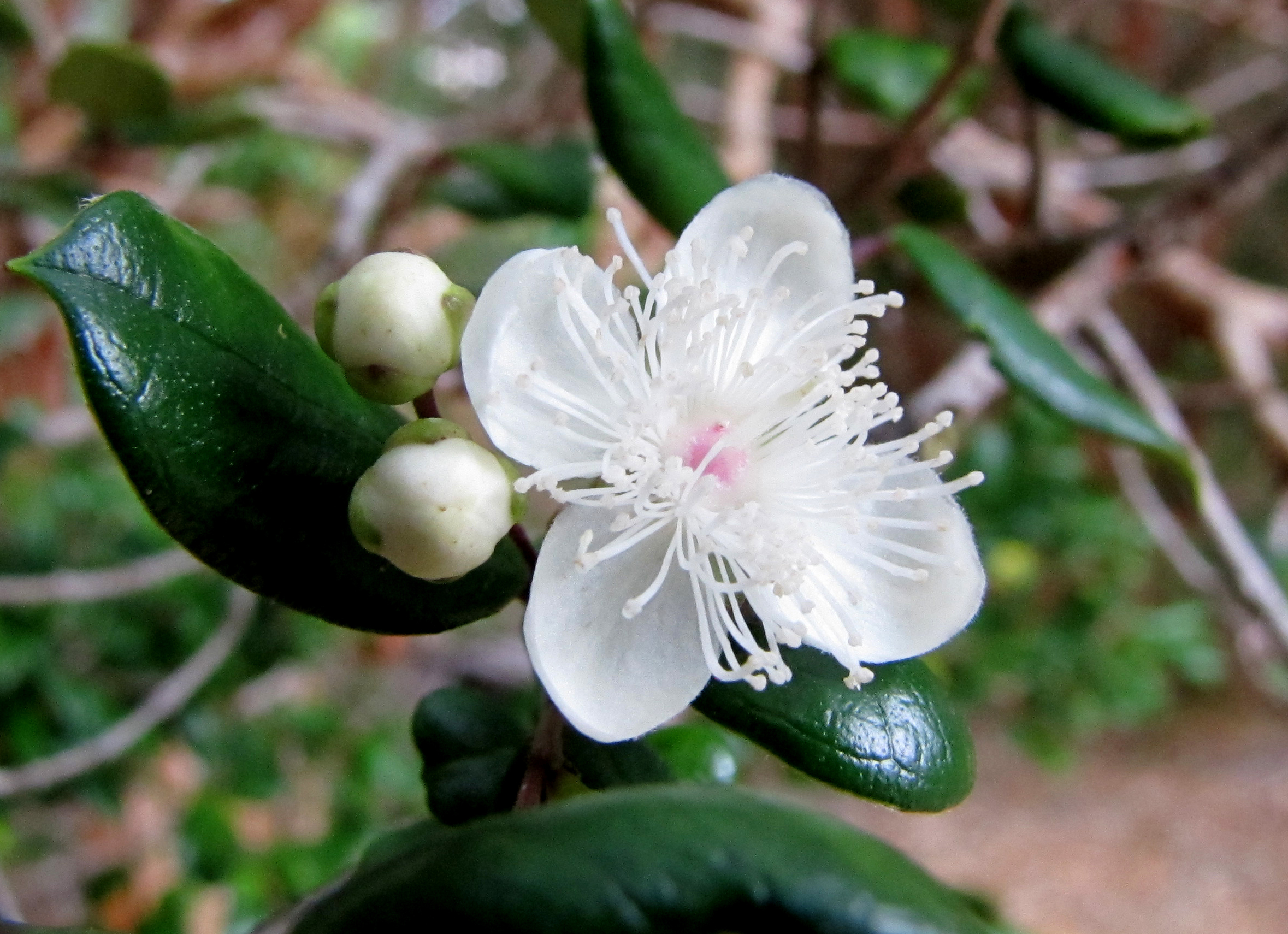 Flor de Arrayán, Bariloche, Argentina